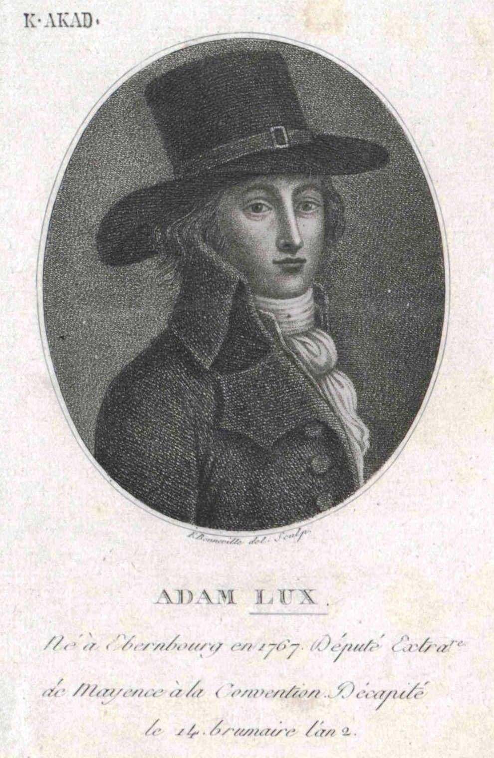 Adam Lux (1766-1793)